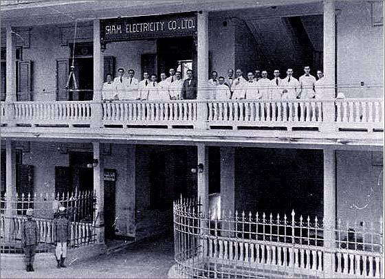 โรงไฟฟ้าวัดเลียบ